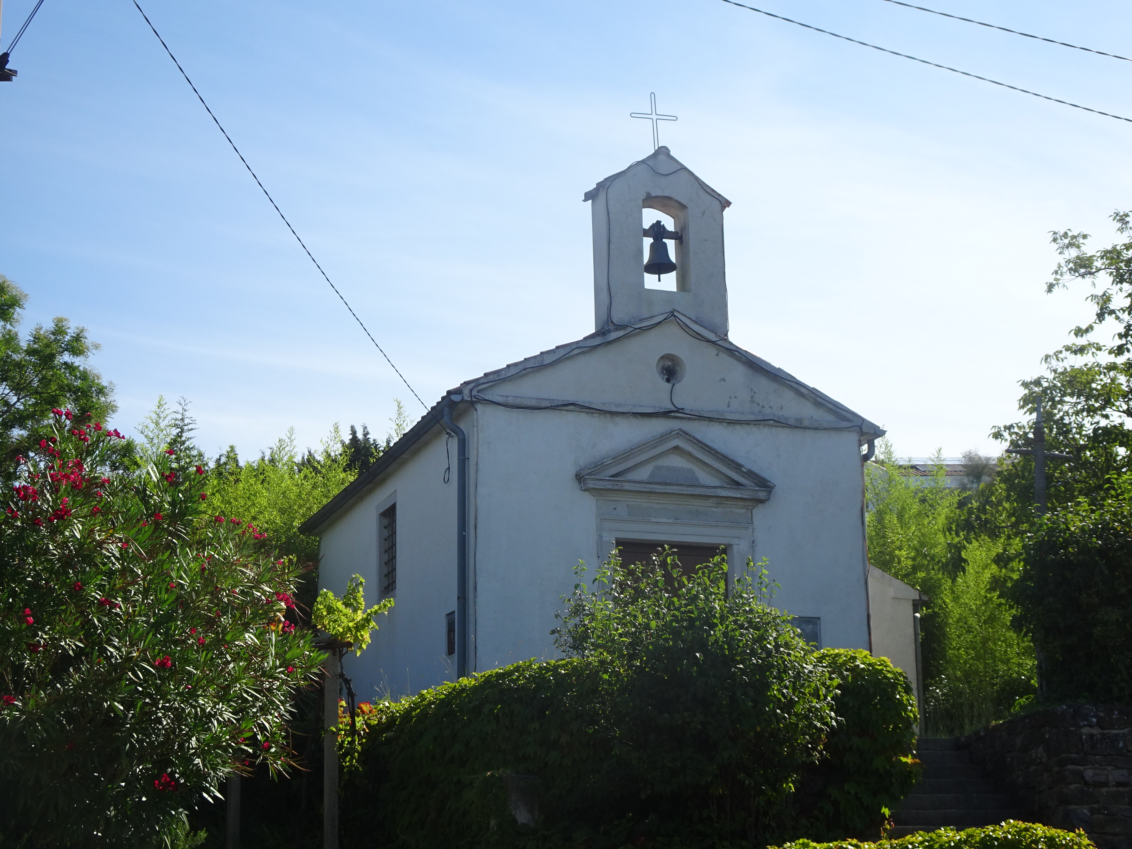 Malija, cerkev